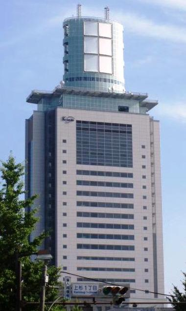 NTT DoCoMo東北ビル･北側より撮影 The DoCoMo Tohoku Biru building. Sendai, Japan 撮影者:NAGIE 撮影日:2007年8月5日 投稿者:撮影者に同じ